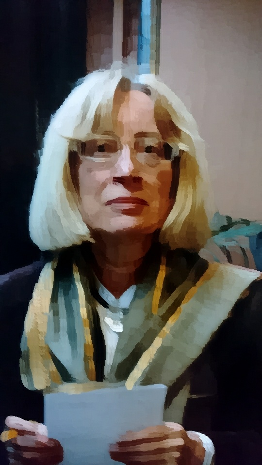 Foto van Gonda Lesaffer